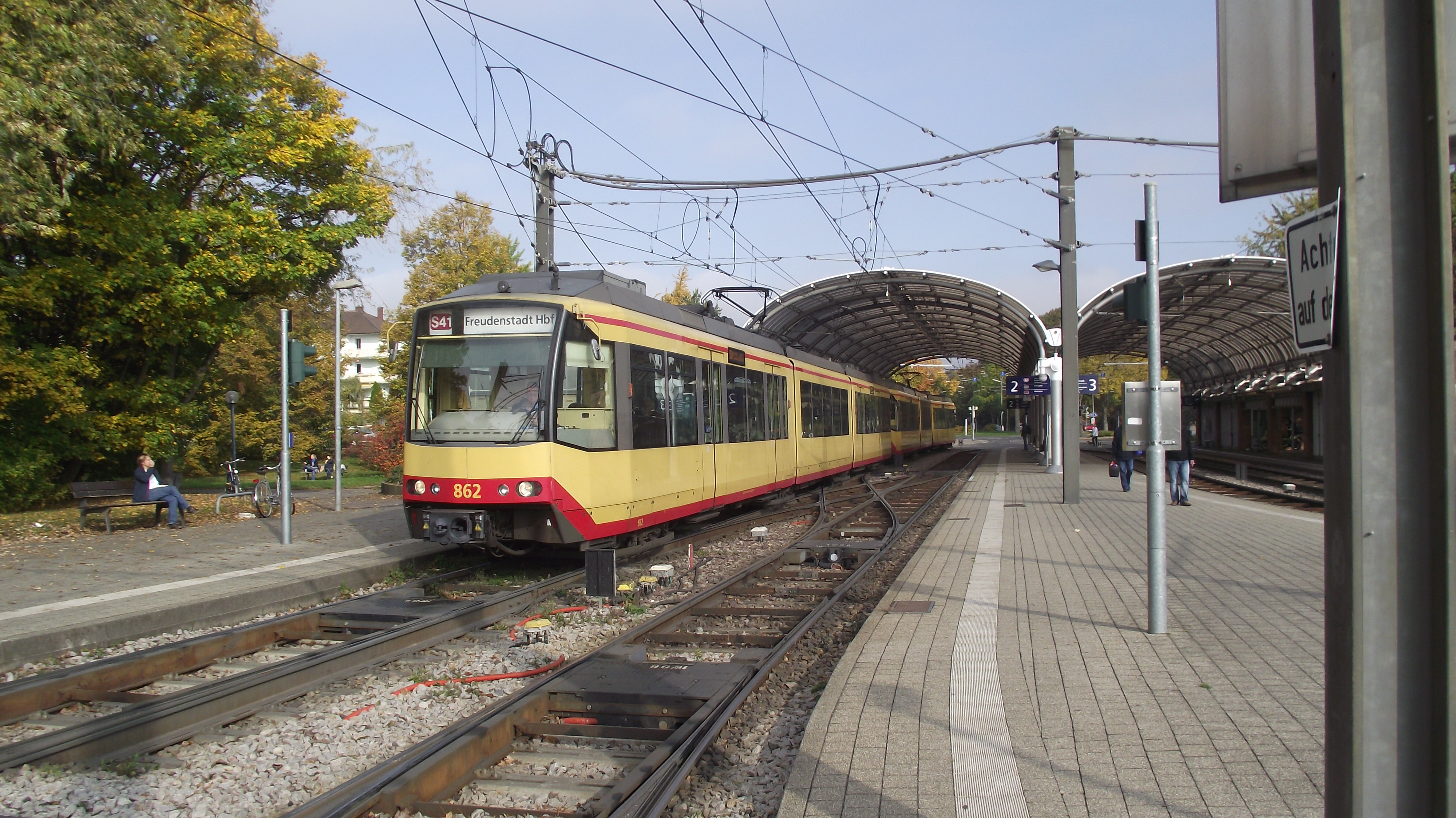 Albtalbahnhof